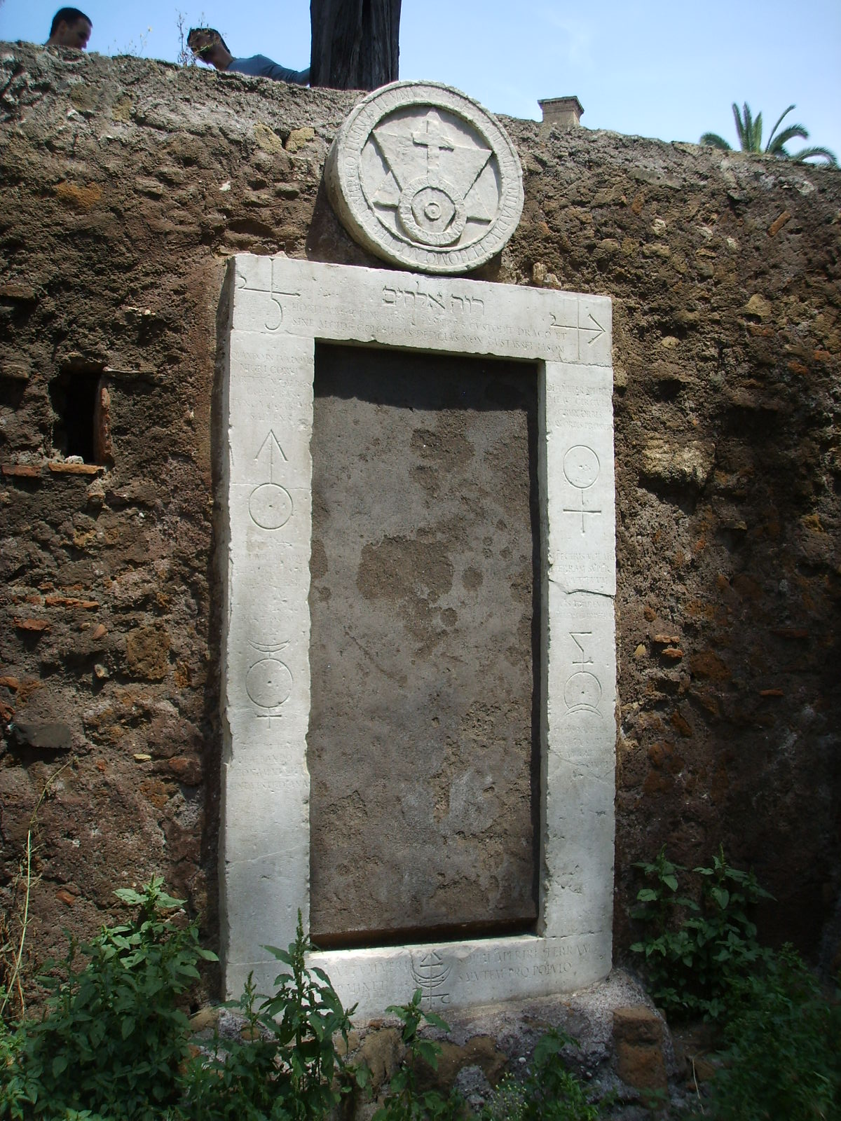 Magic gate (Porta magica) in Piazza Vittorio Emanuele, in Rome, Italy